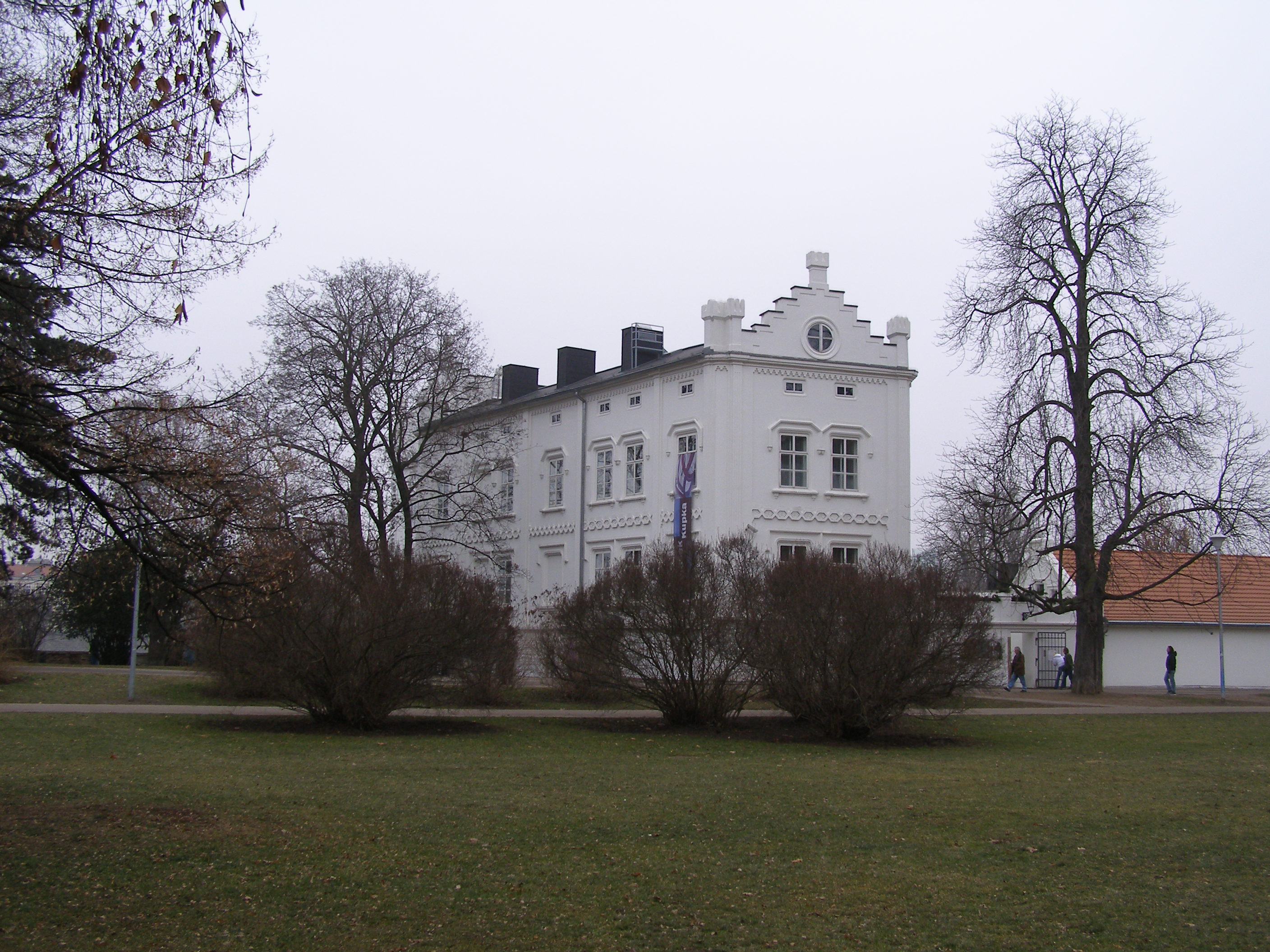 Vodní mlýn Sovovy mlýny (Malá Strana), Praha 1, U Sovových mlýnů 503/2, Malá Strana